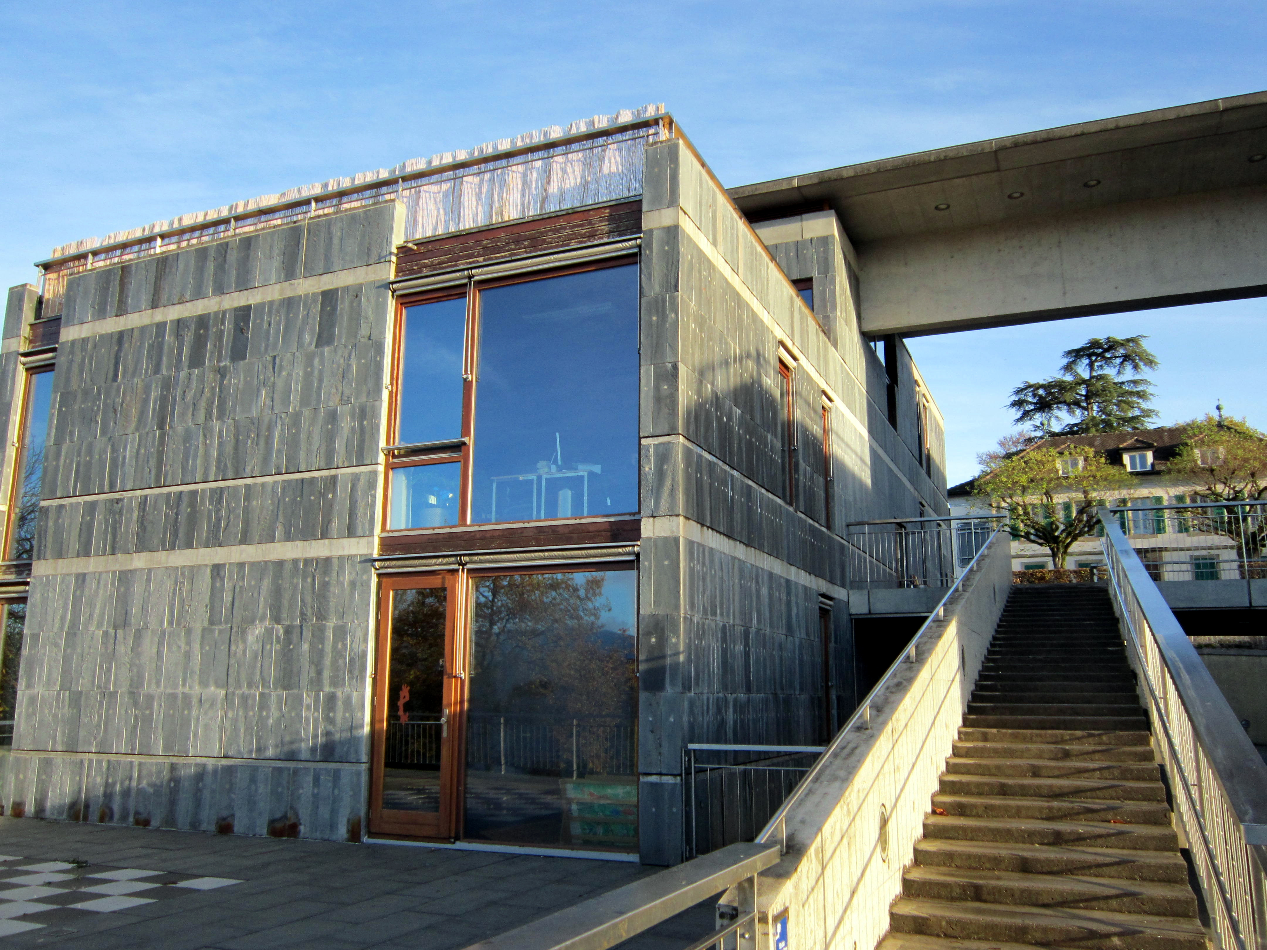 Centre de loisirs - Le Grand-Saconnex - Suisse architectes Devantery et Lamunière